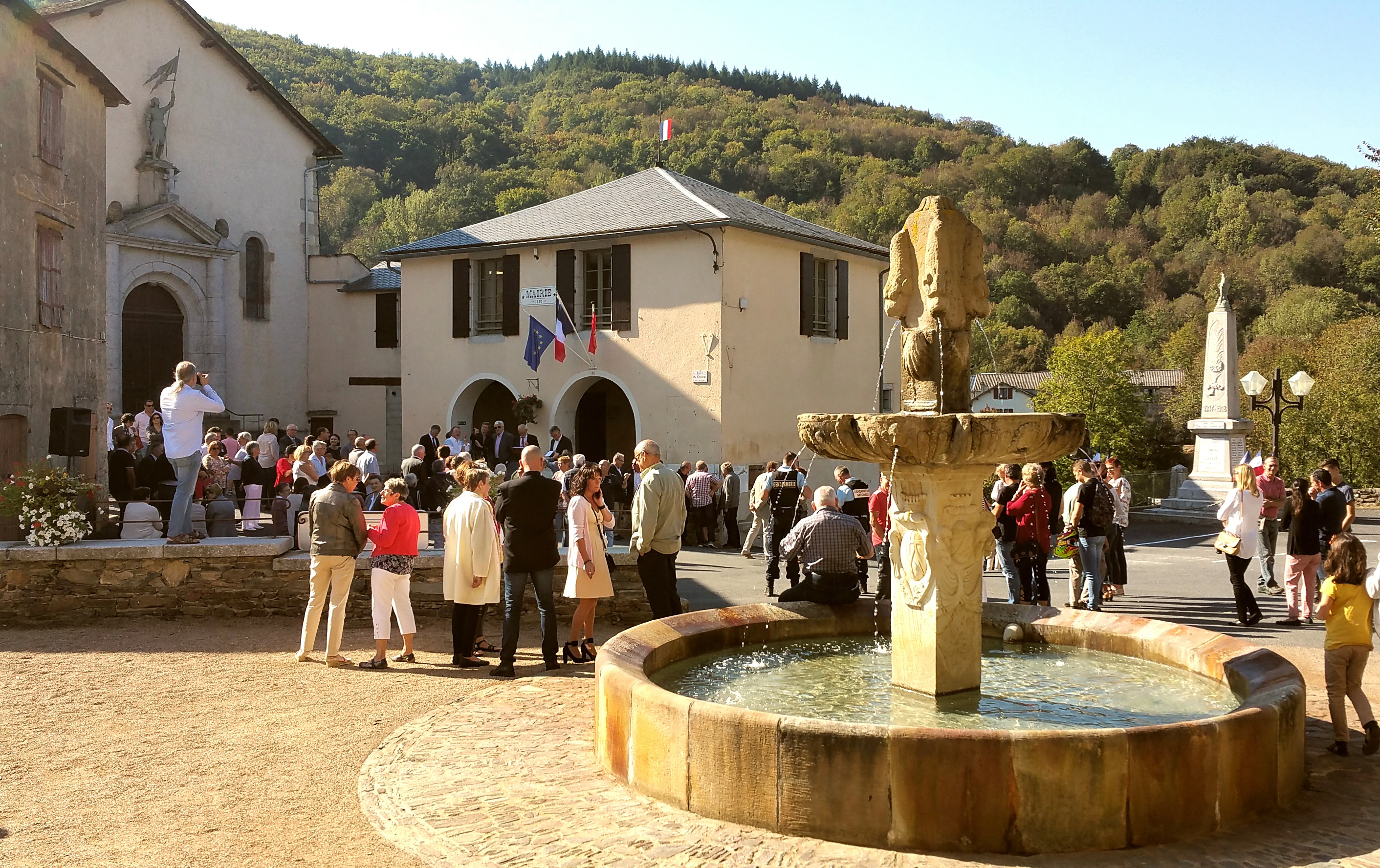 Homologation de Lacaze en tant que "Petite cité de caractère"